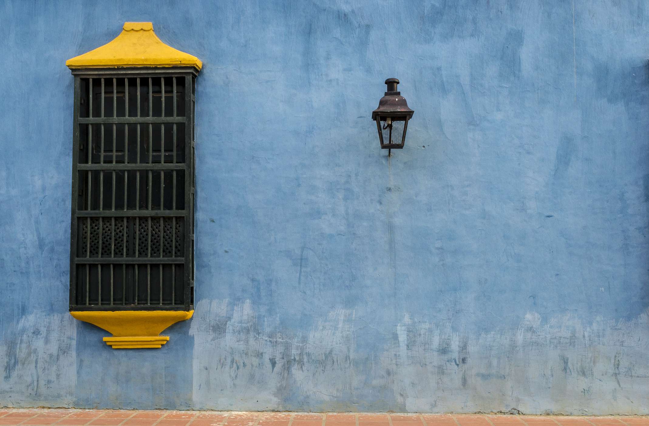 Coro, Falcón. Venezuela